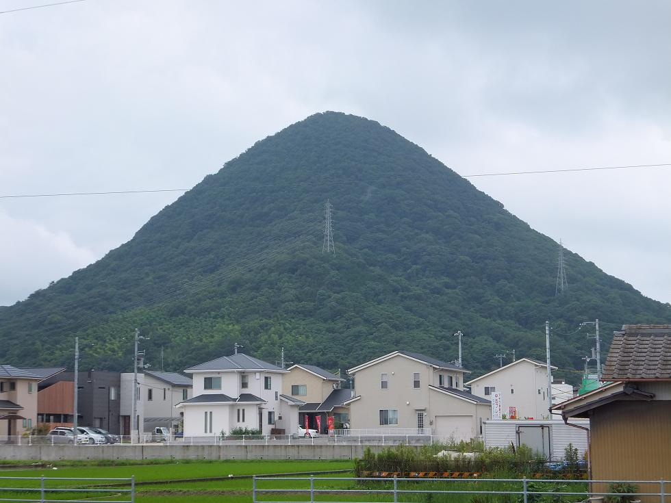 香川県高松市 讃岐七富士の一つ 六ツ目山